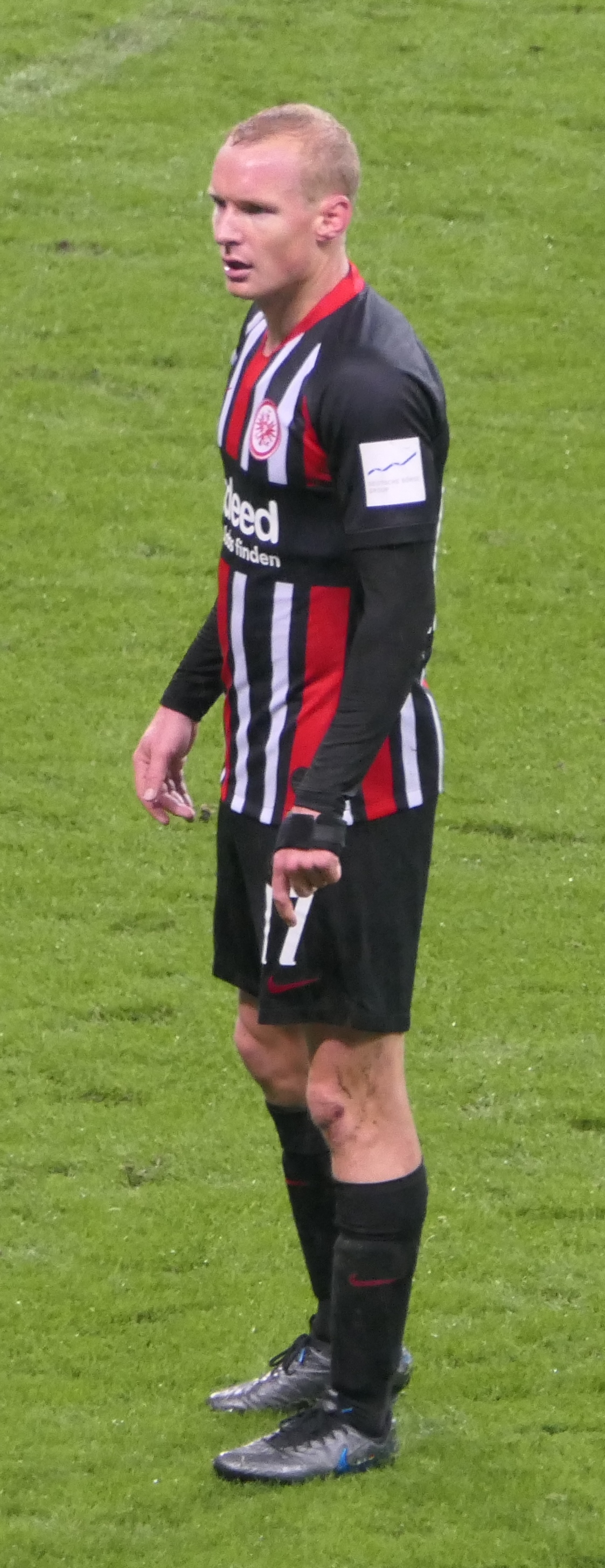 Der Fussballprofi Sebastian Rode im Trikot von Eintracht Frankfurt beim Heimspiel gegen den SV Werder Bremen am 06.10.2019.